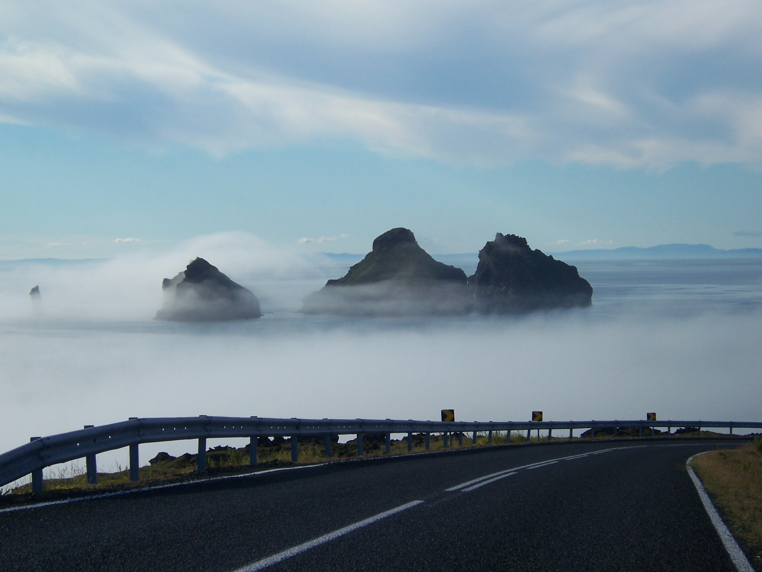 Smáeyjar við Vestmannaeyjar umluktar þoku photo by Gisli Sig. Eiríksson